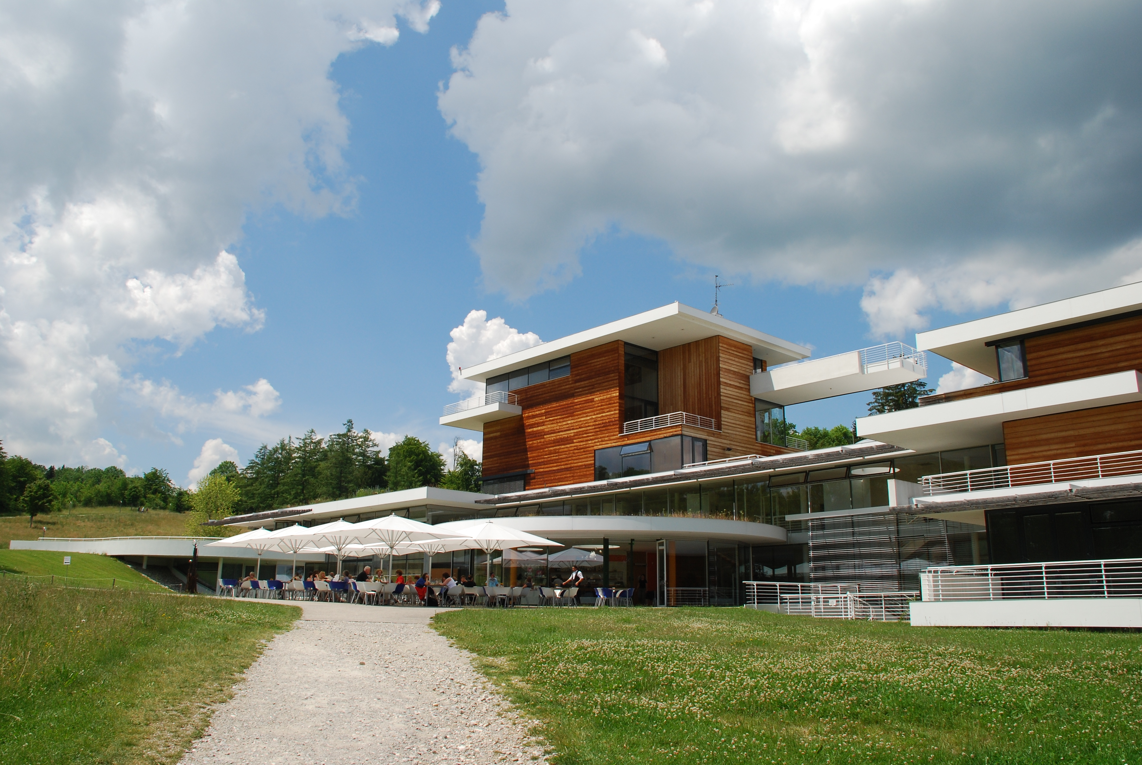 Museum der Phantasie